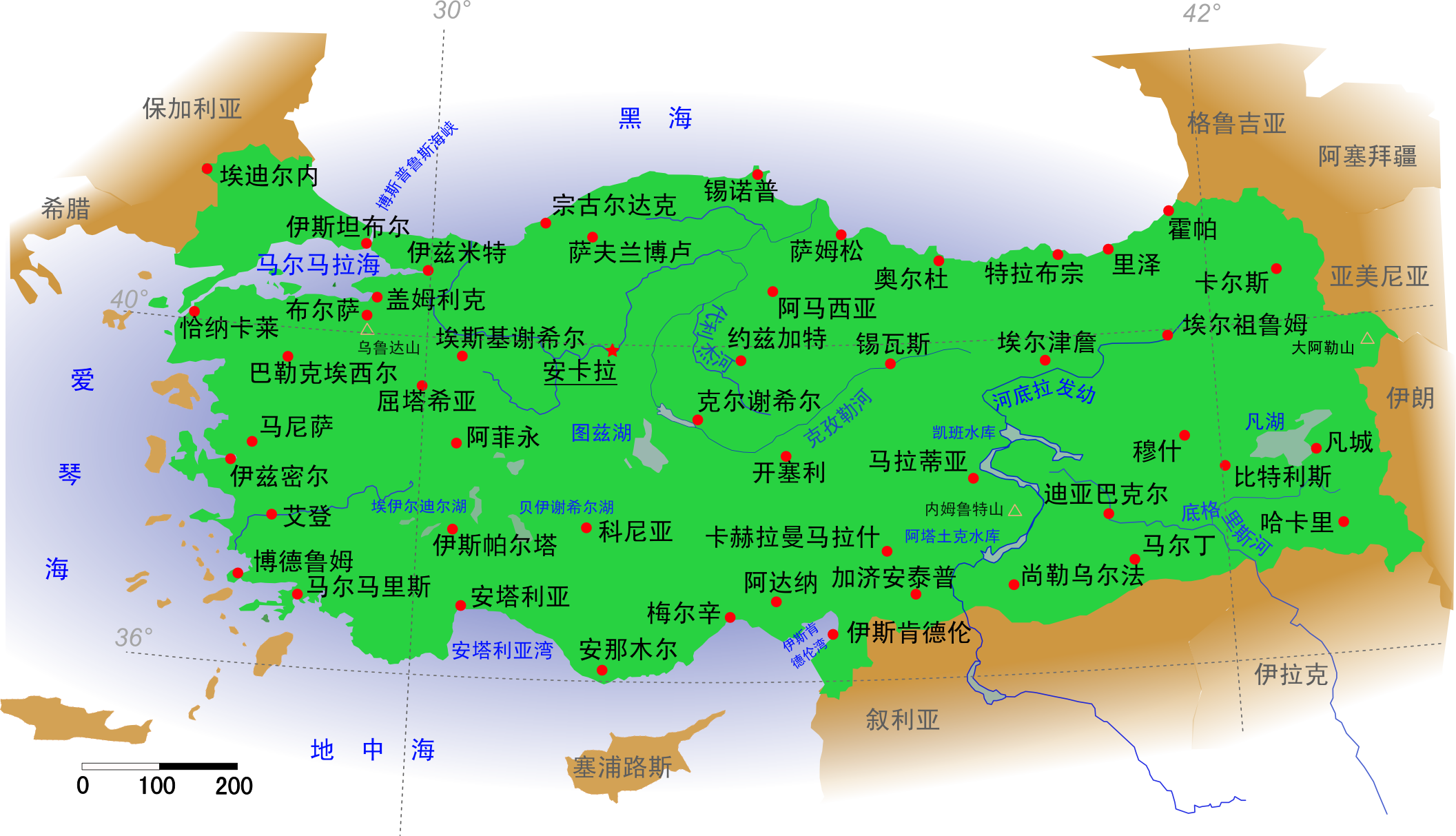 土耳其主要城市地图。